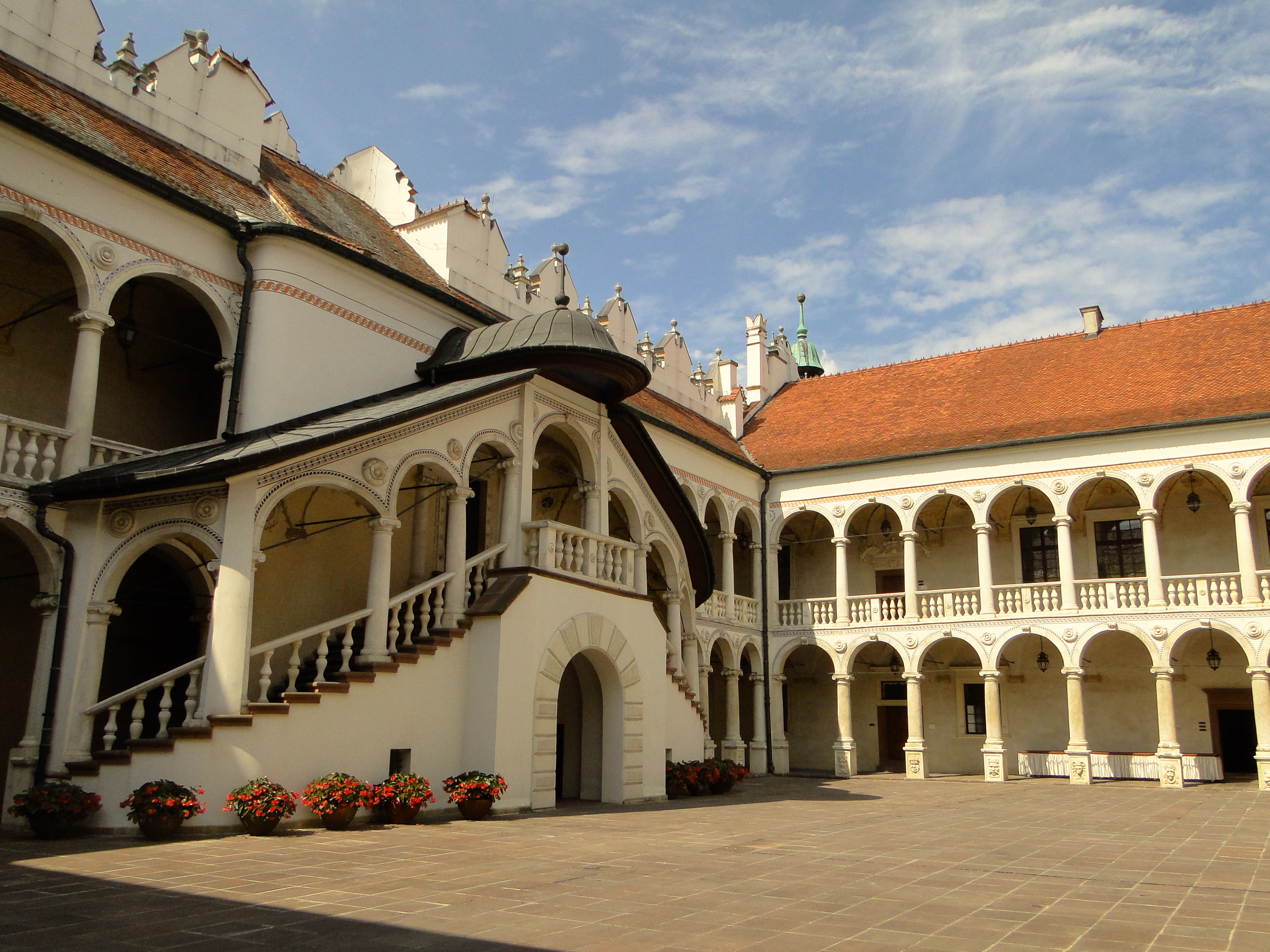 Widok na dziedziniec pałacu.